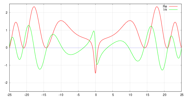 Wykres części urojonej i rzeczywistej na prostej krytycznej